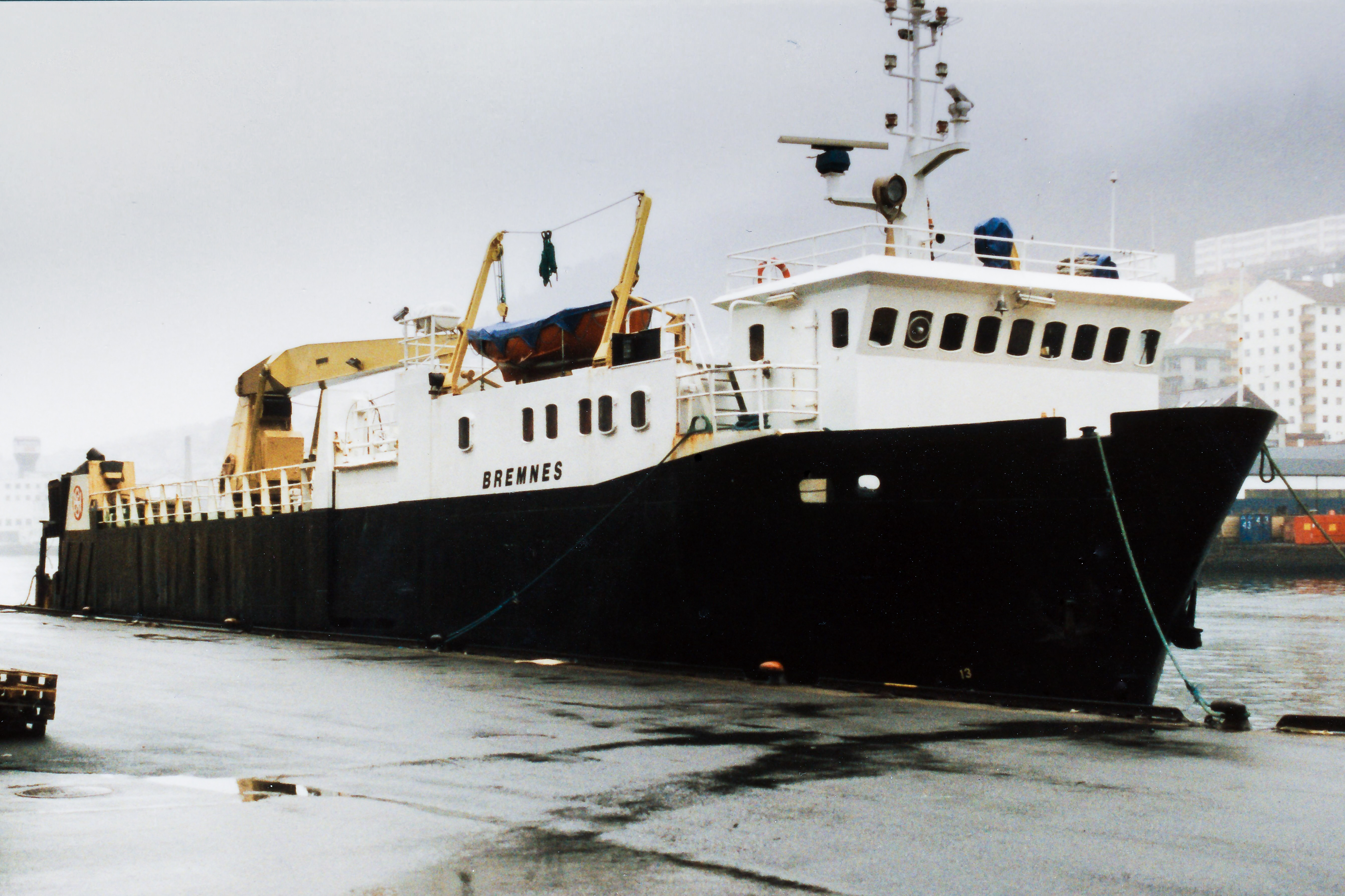 MS Bremnes, ex. Unika, i Bergen på 1990-tallet. Foto Harald Sætre